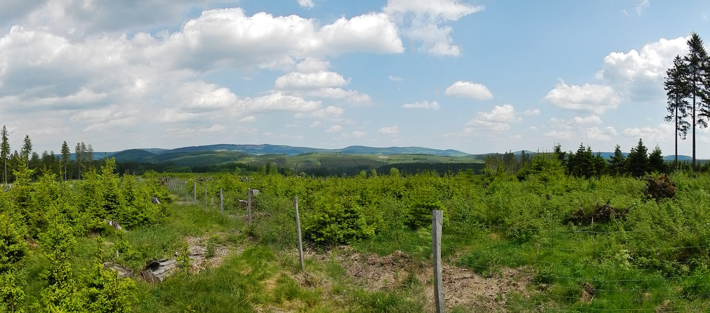 Naturpark Rothaargebirge / Sturmschaden durch Kyrill 2007